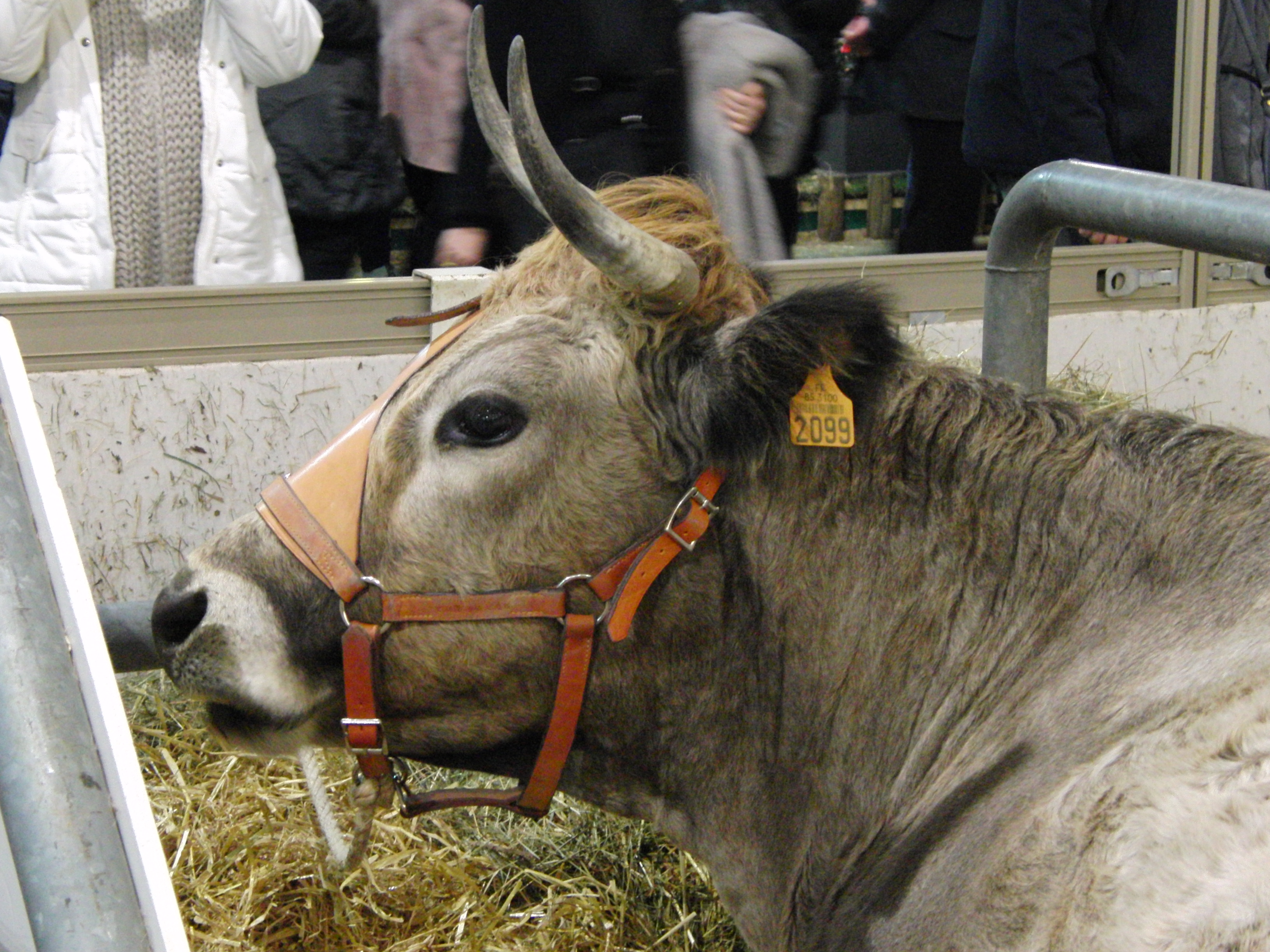 Vache Maraîchine - Salon international de l'agriculture 2013, Paris, France